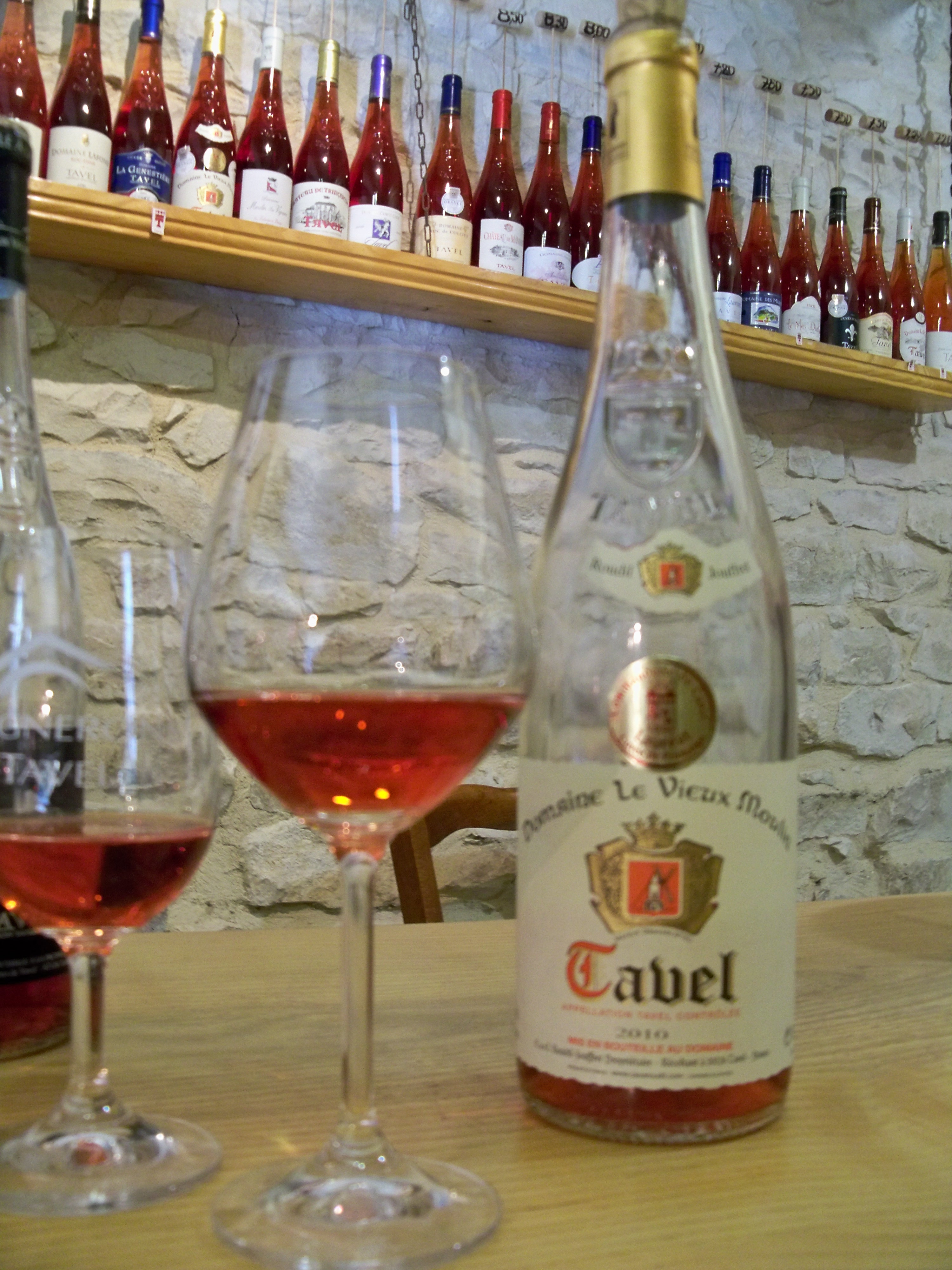 Glass of Tavel wines